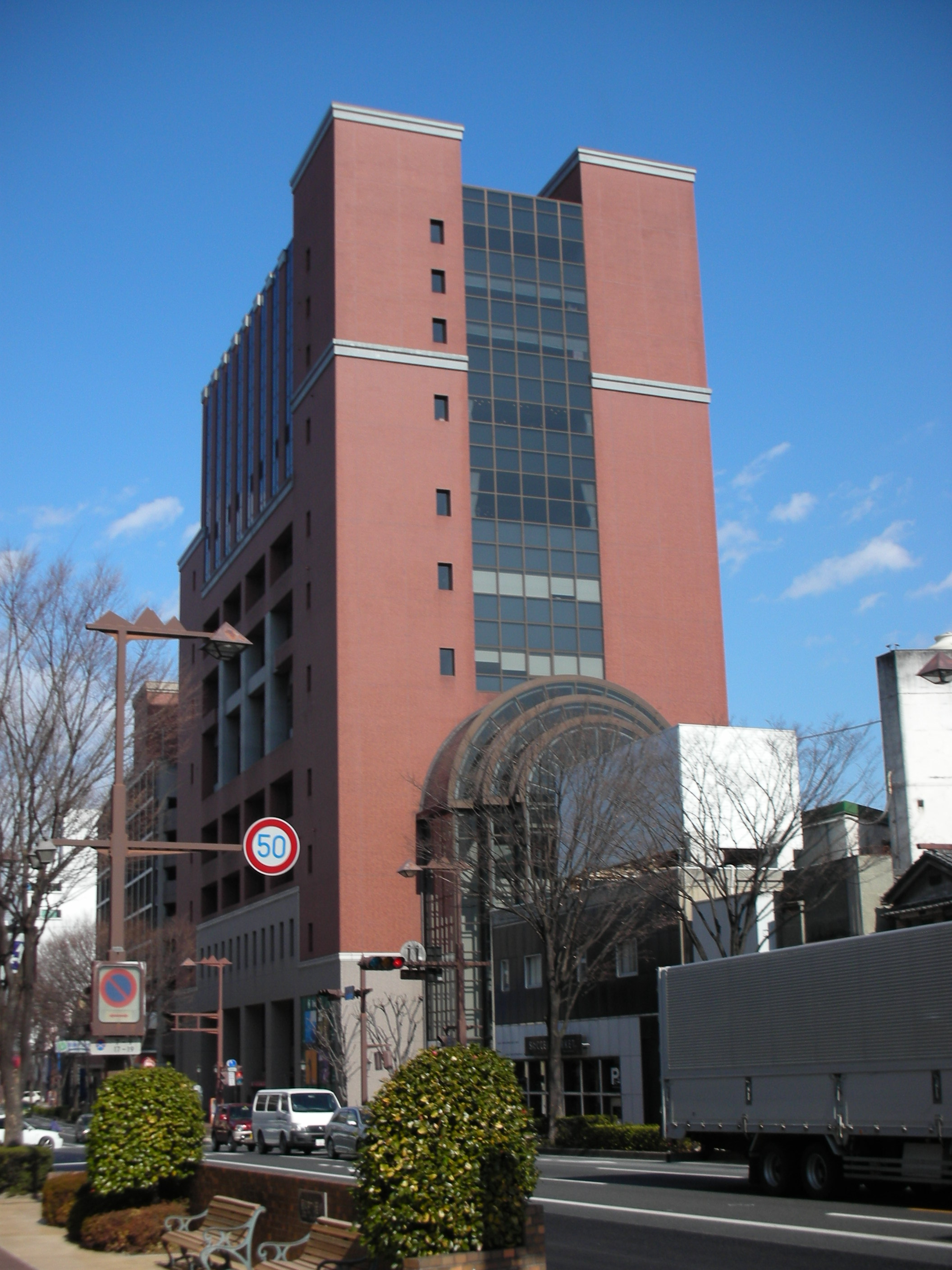 前橋テルサの外観